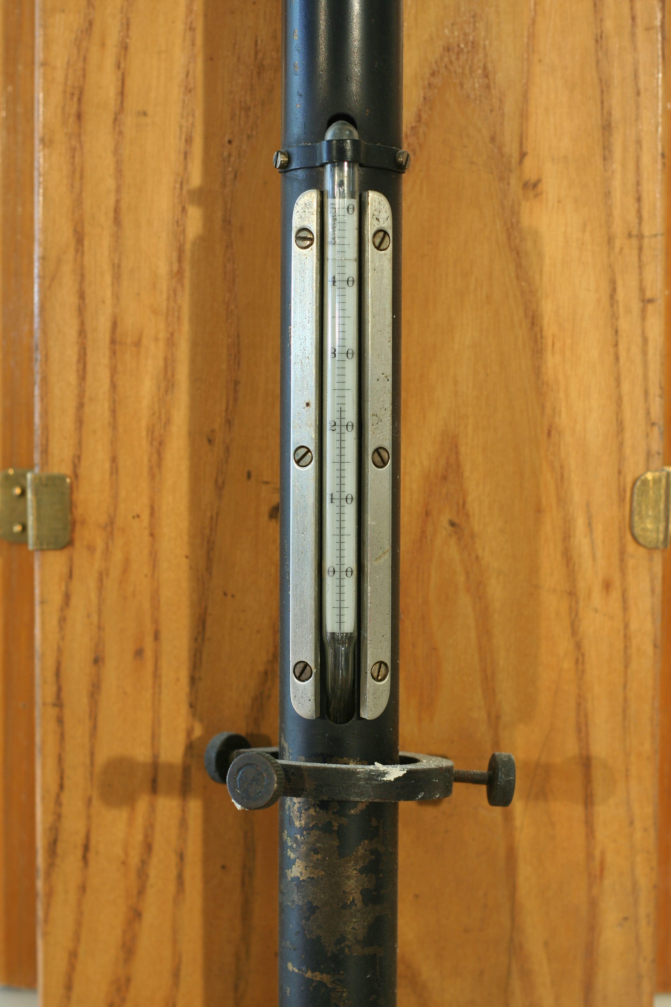 Teploměr k měření teploty trubice se rtutí